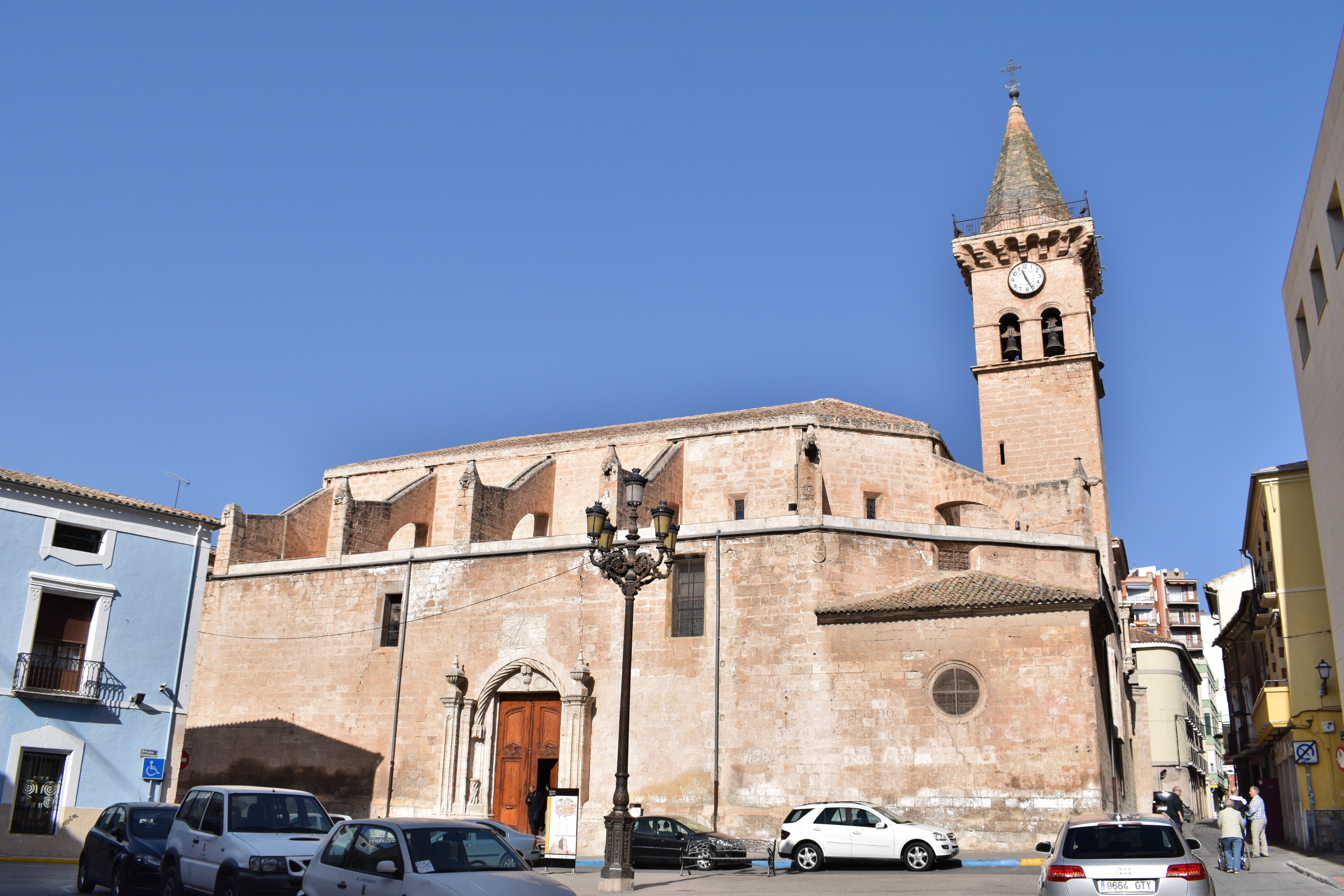 Villena.